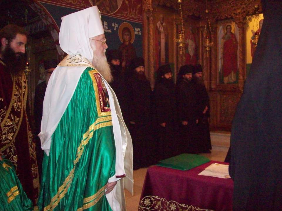 Mitropolit Evloghios, Anghelos , Bishop Porfirios and Bishop Avondios